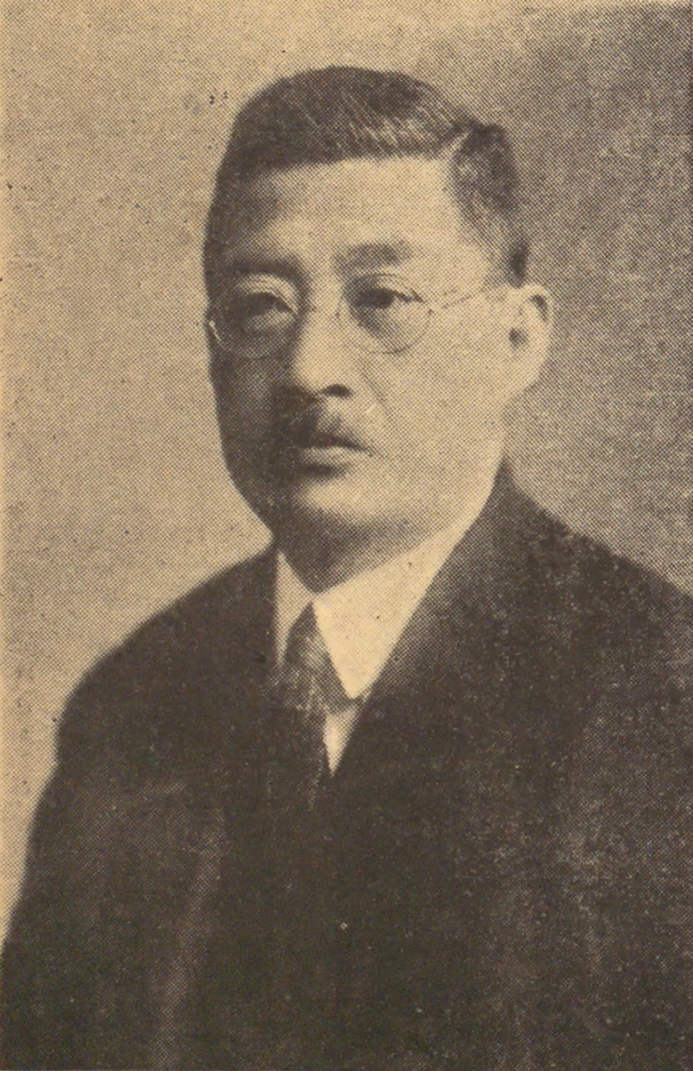 Keikichi Tanomogi (頼母木桂吉, 1867–1940)